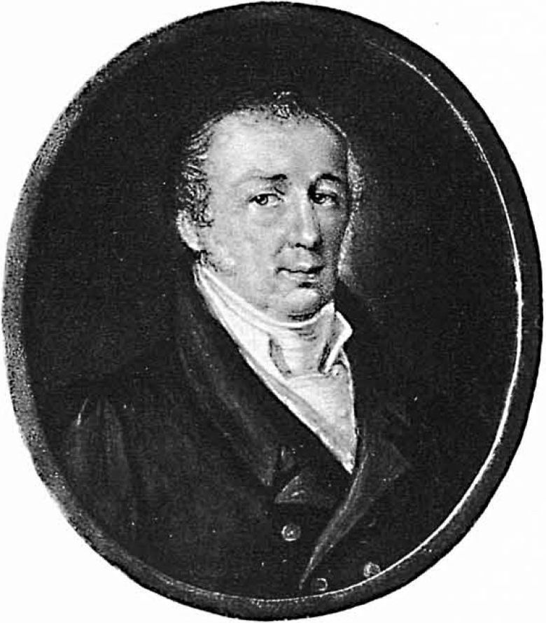 Граф Дмитрий Александрович Зубов (1764-1836)